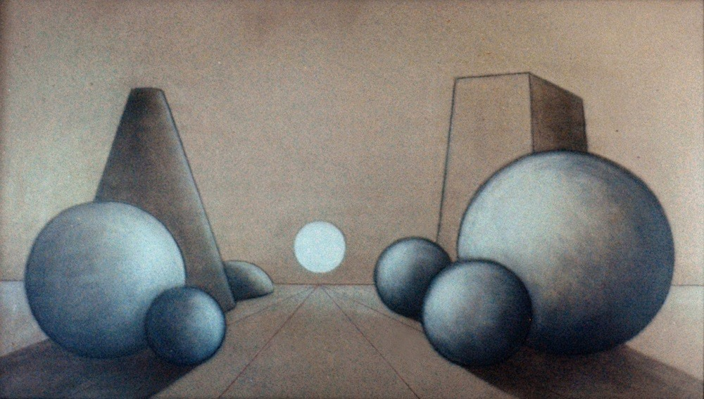 Endzeitliche Landschaft, 1987, 80 x 120 cm, in der Sammlung des Kunstministeriums Stuttgart